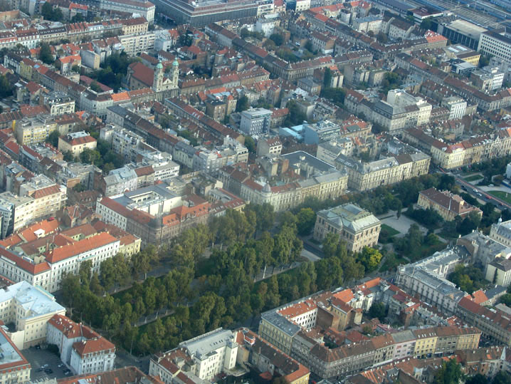 Park Zrinjevac i Strossmayerov trg u Zagrebu, te okolne ulice, iz zraka